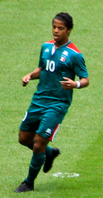 Ousmane Mané